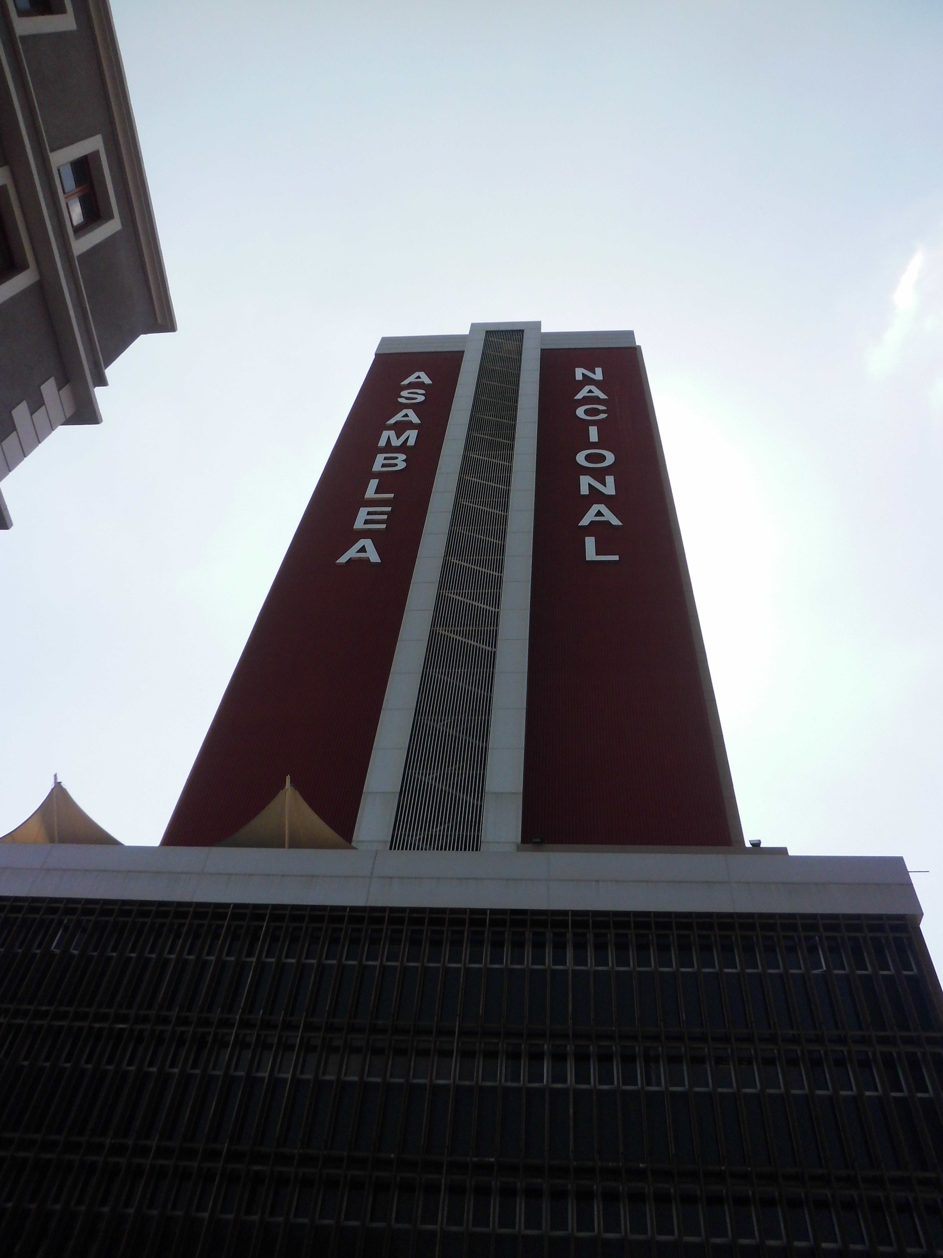 Edificio Administrativo de la Asamblea Nacional de Venezuela "Jose María Vargas"